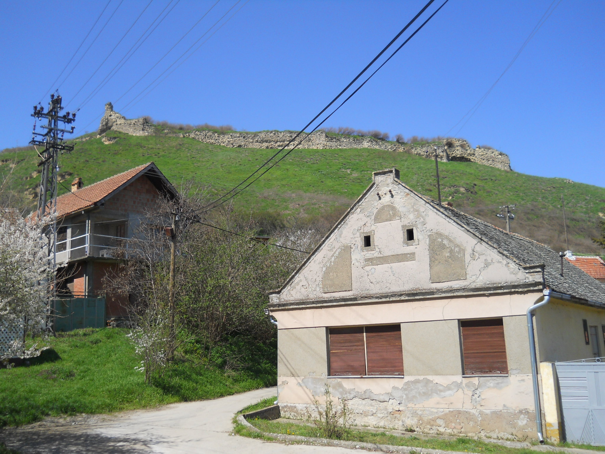 Szalánkemén/Stari Slankamen - a vár alatt